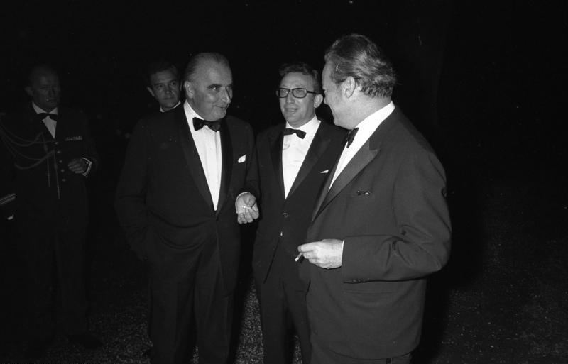 Brandt gibt Abendessen für Pompidou auf Schloß Gymnich